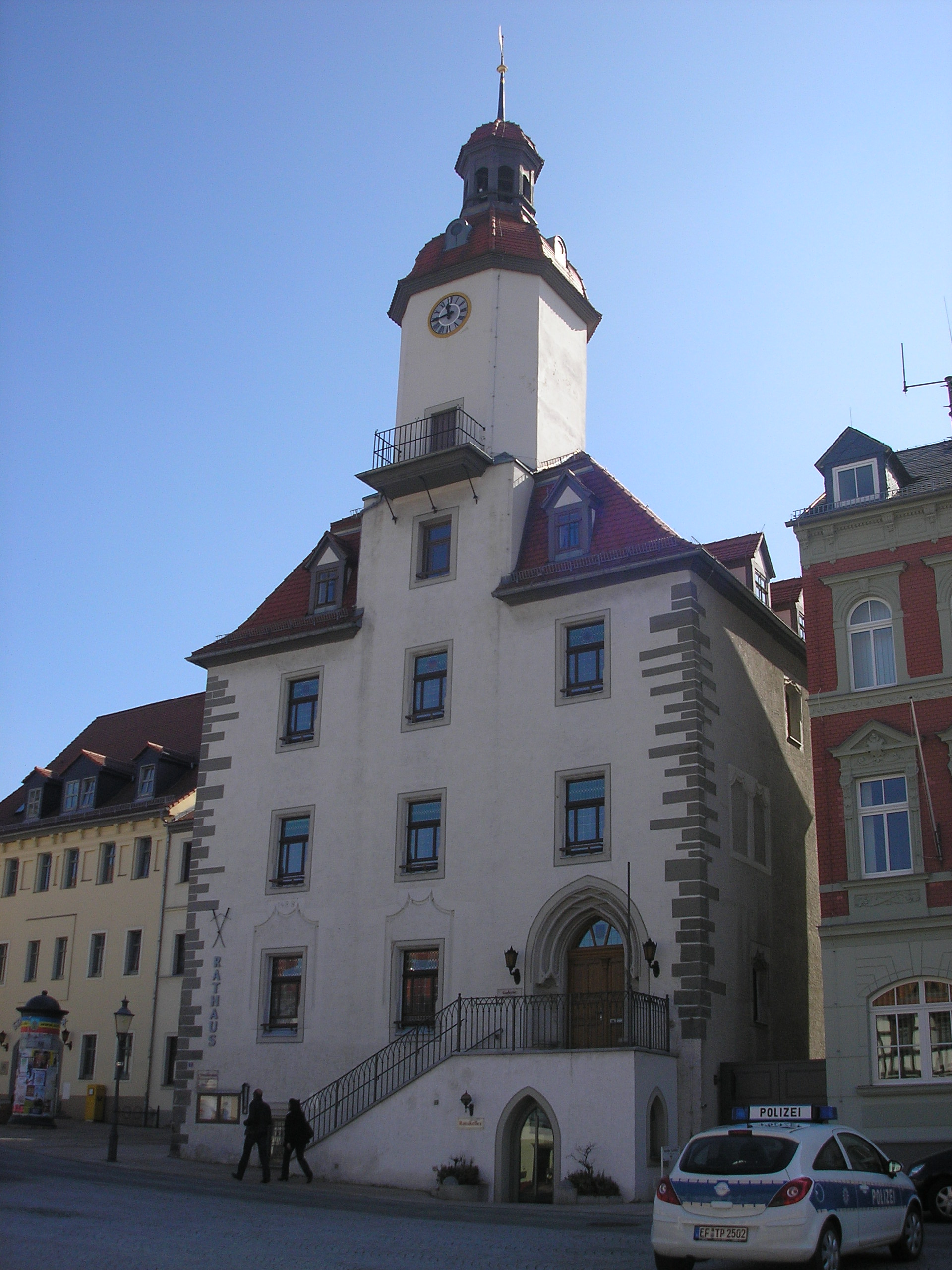 Das Rathaus in Schmölln (Thüringen).